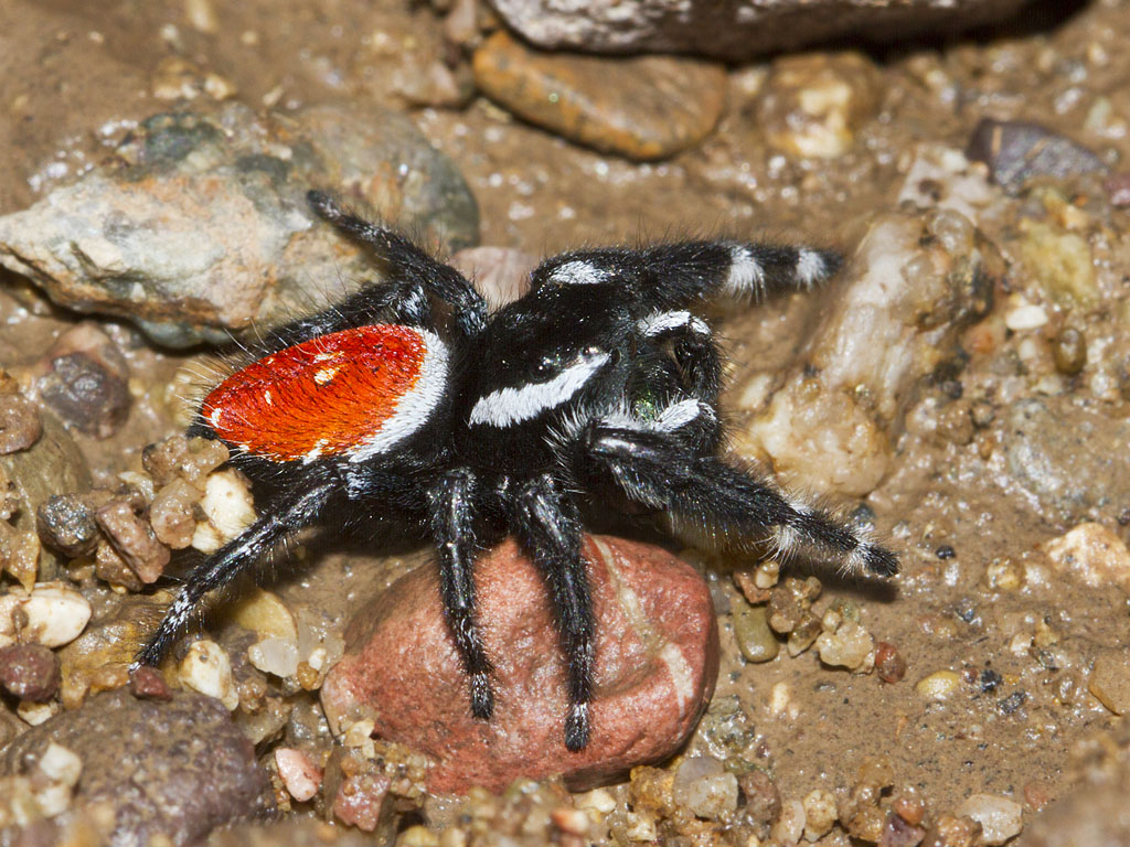 Box Canyon, Pima Co., AZ, USA